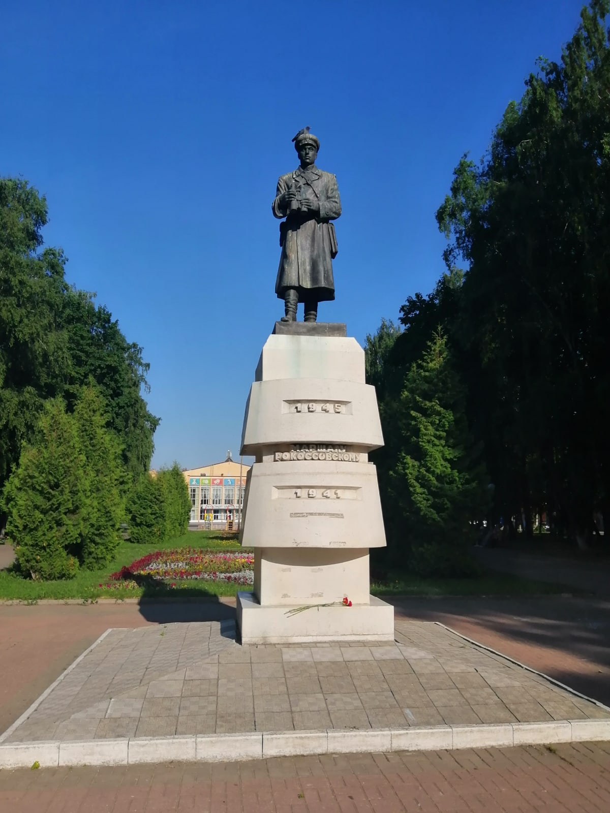 Памятник Рокоссовскому К. К. на площаде Рокоссовского в городе Курске.